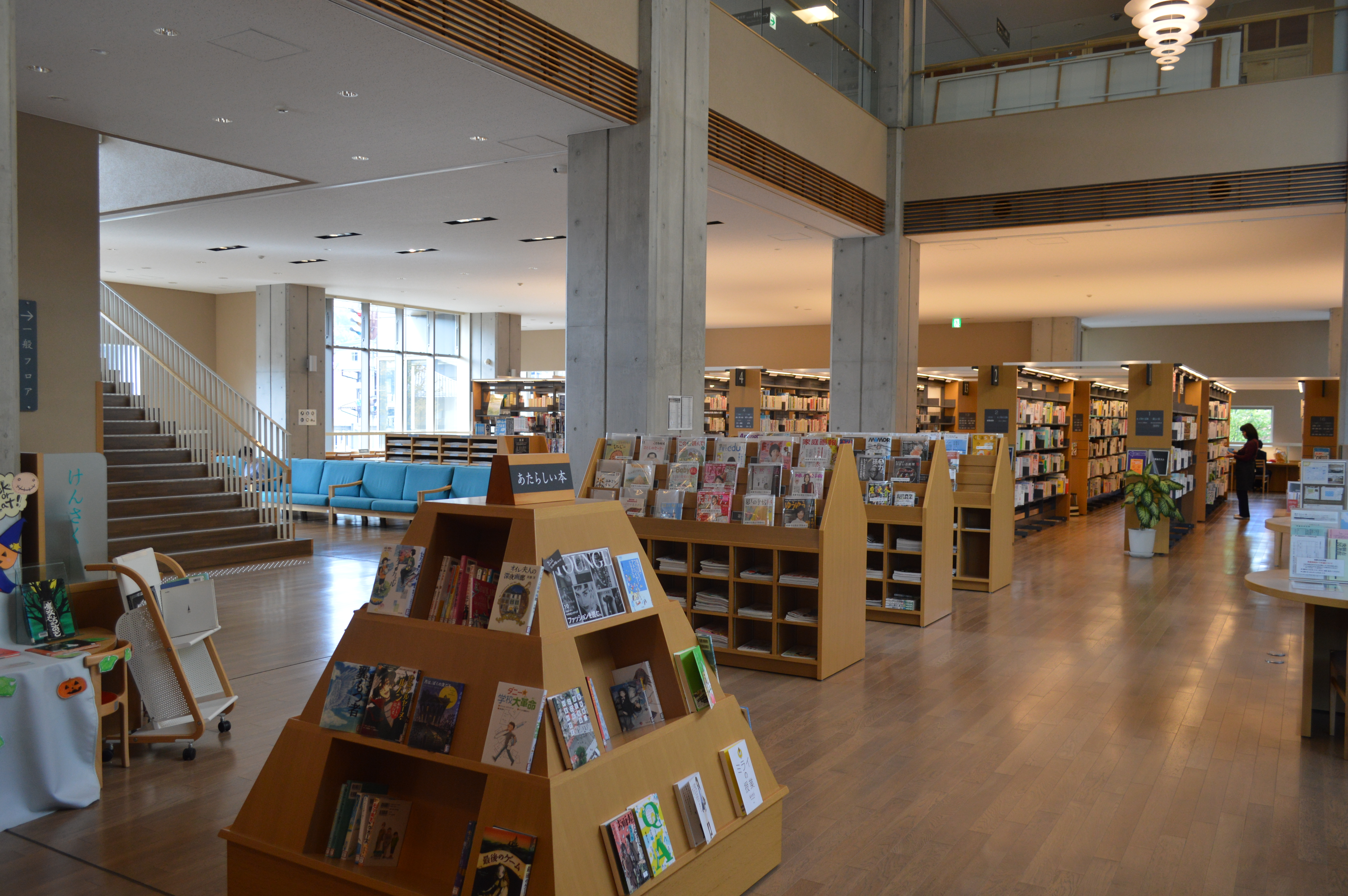 飛騨市立図書館。